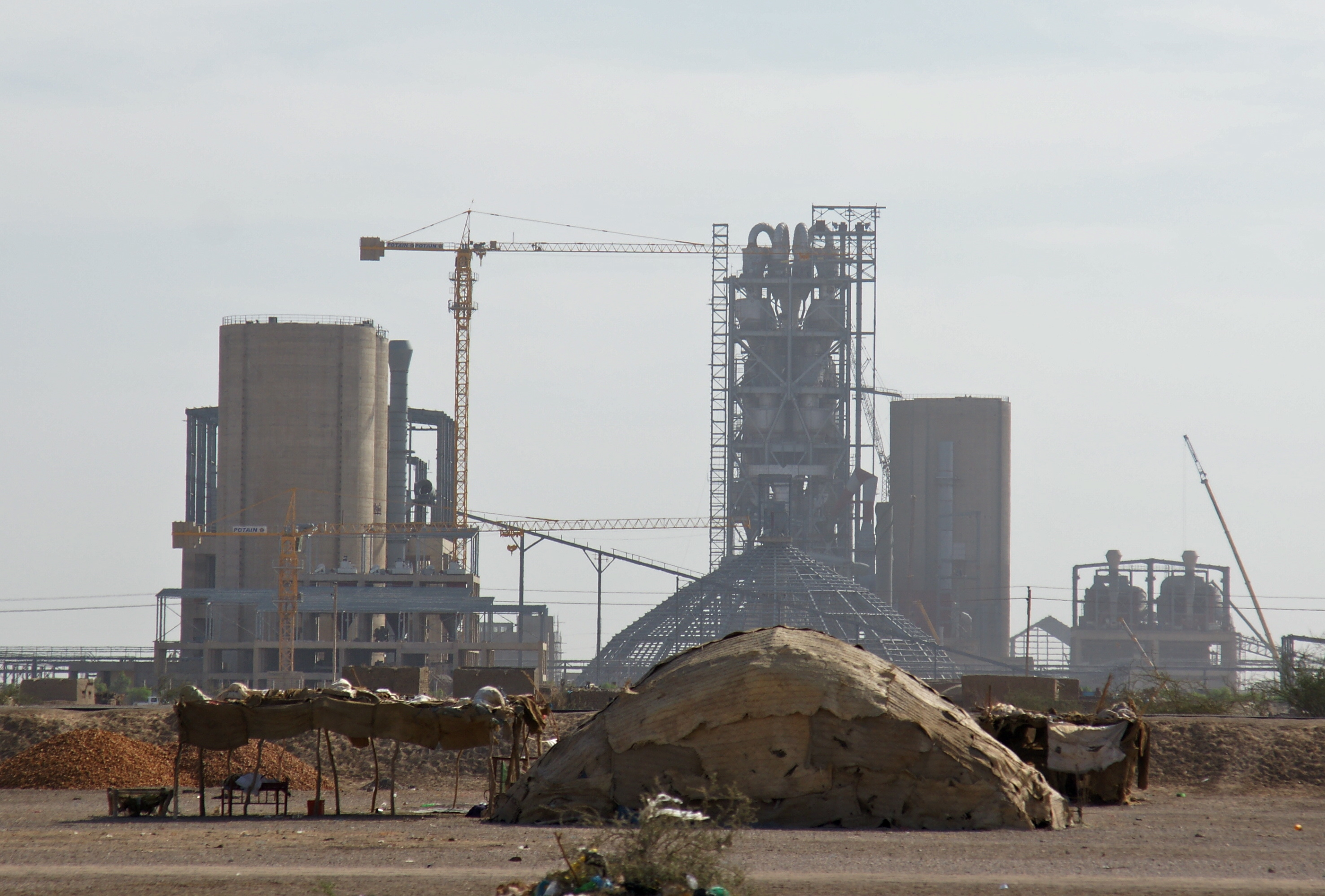 Meroe to Karima (Jebel Barkal)